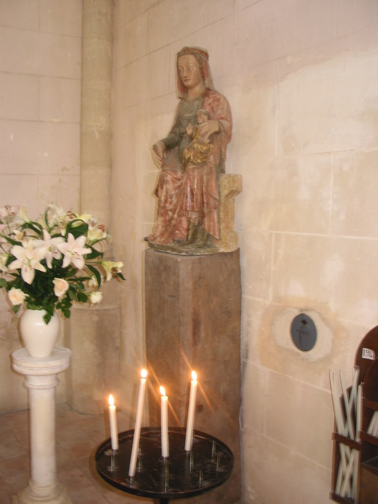 statue de la Vierge à l'enfant, Sainte-Suzanne (Mayenne)